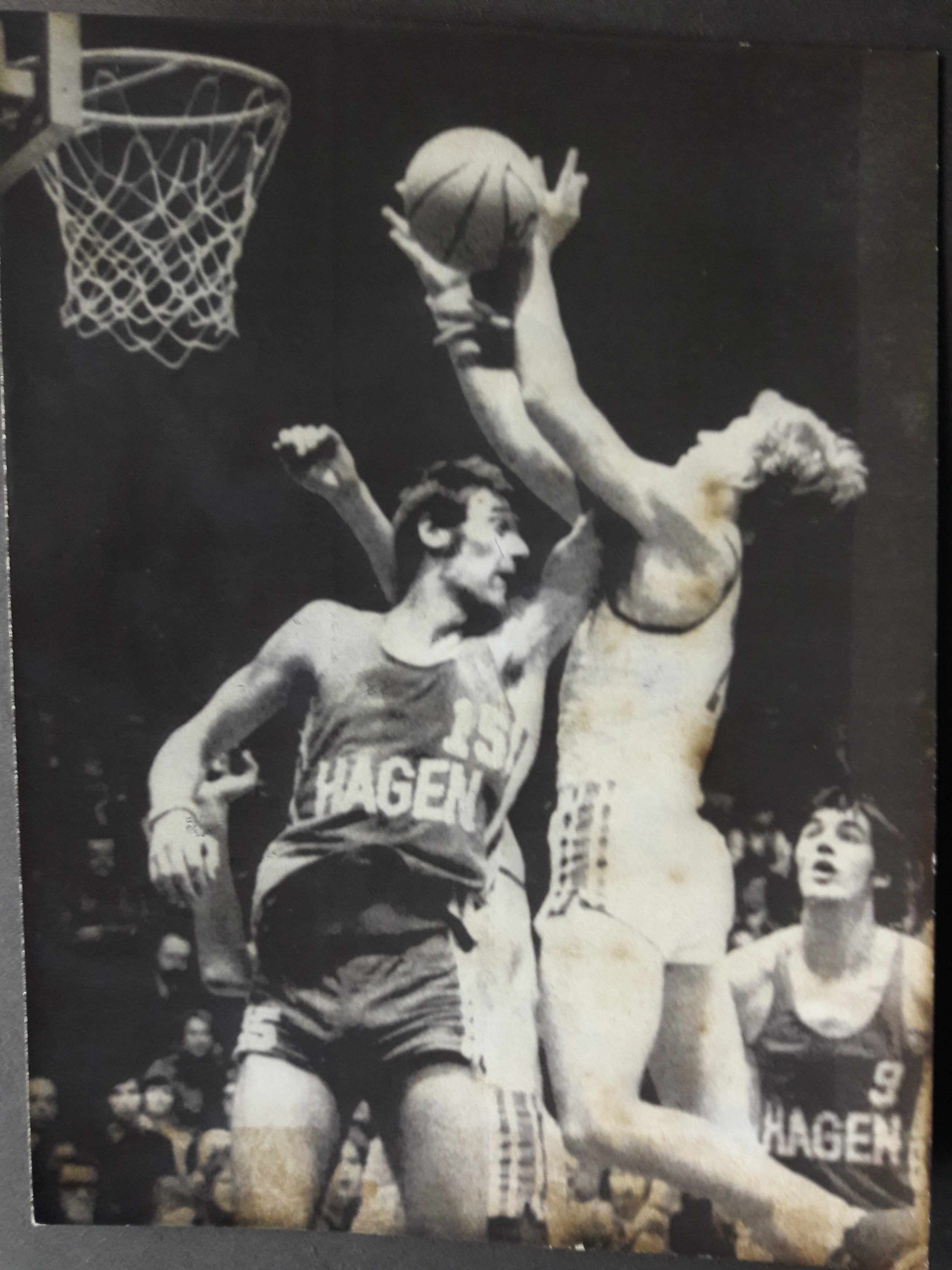 Basketball-Spielszene 1975: Günter J. Glasauer bei einem Basketball-Rebound